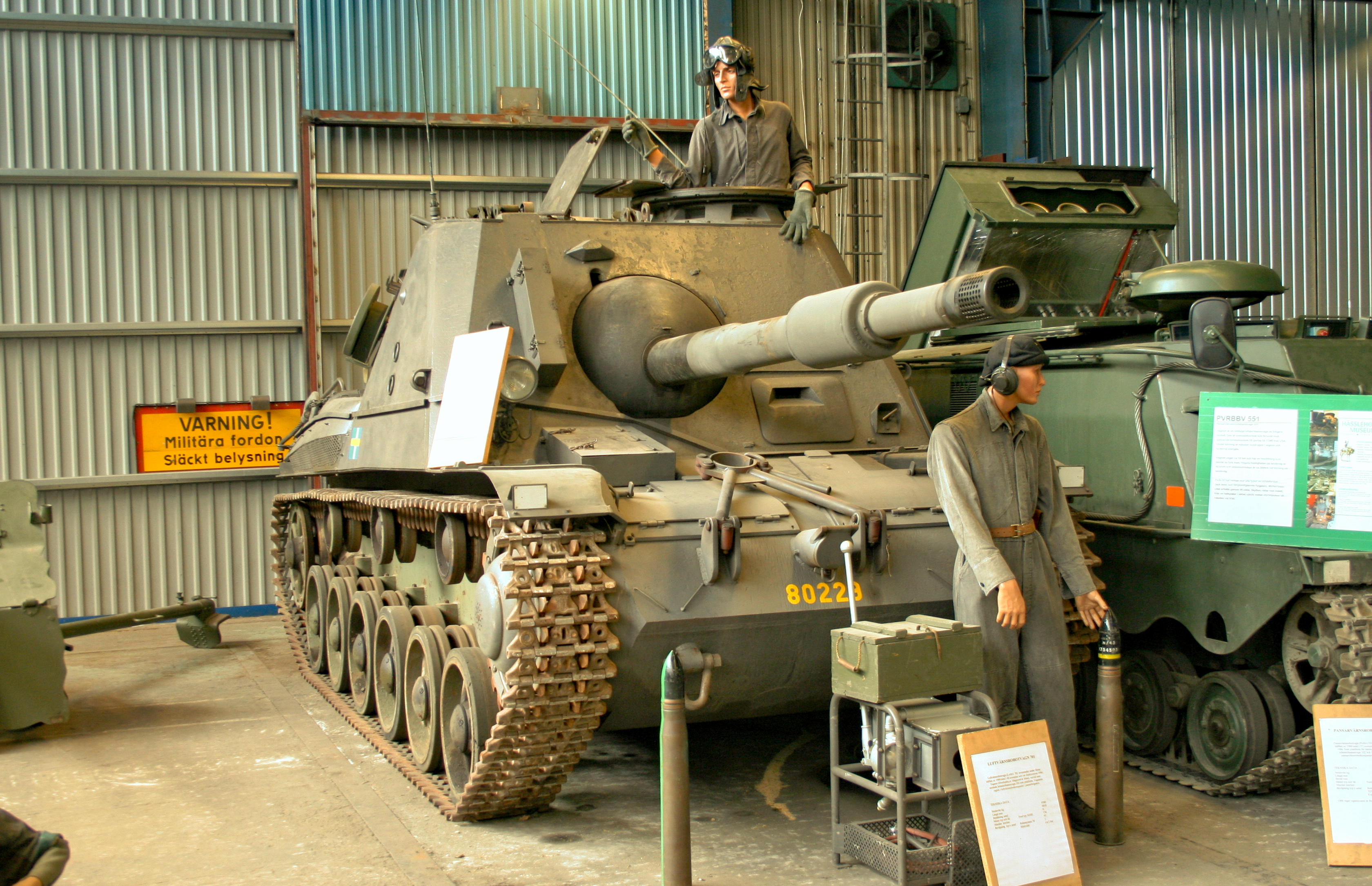 Pansarvärnskanonvagn m/43 i Hässleholms Museum 03.08.2008